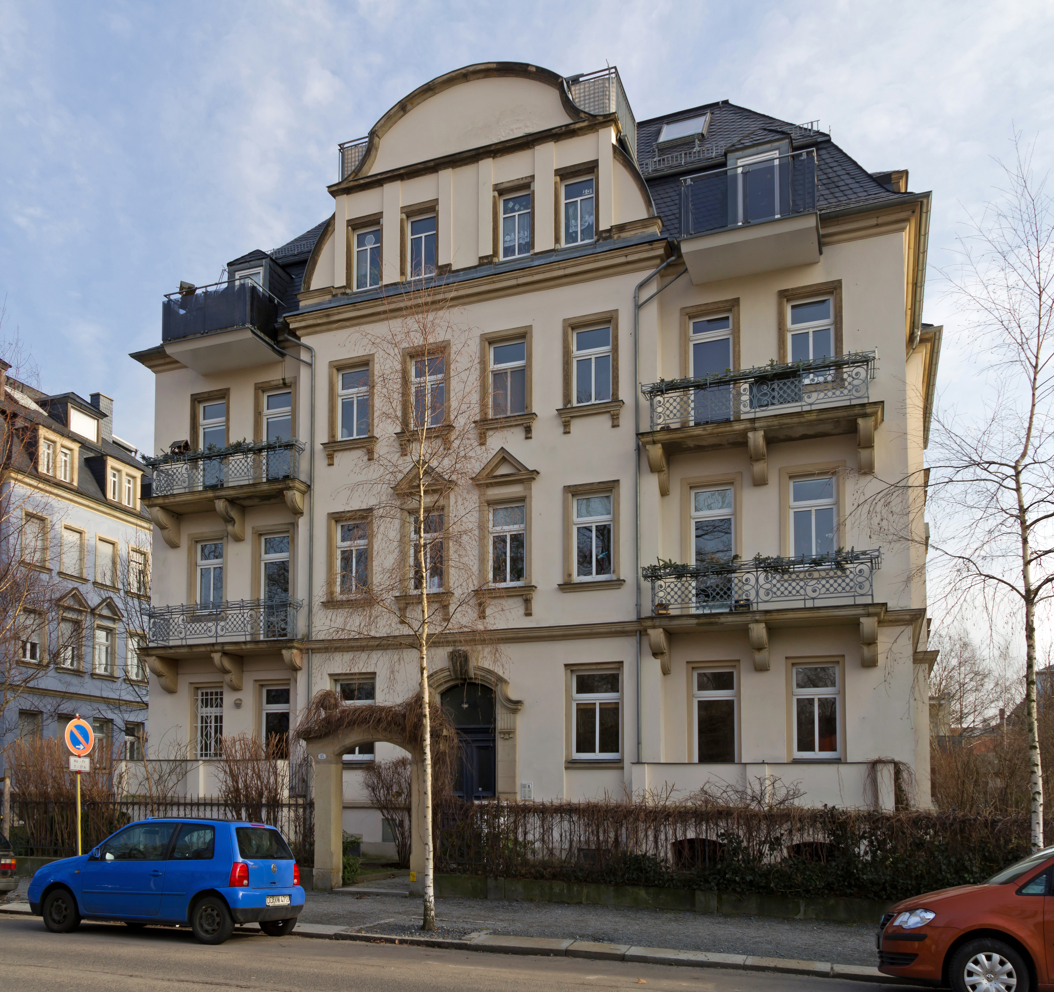 Ermelstraße 15, Dresden